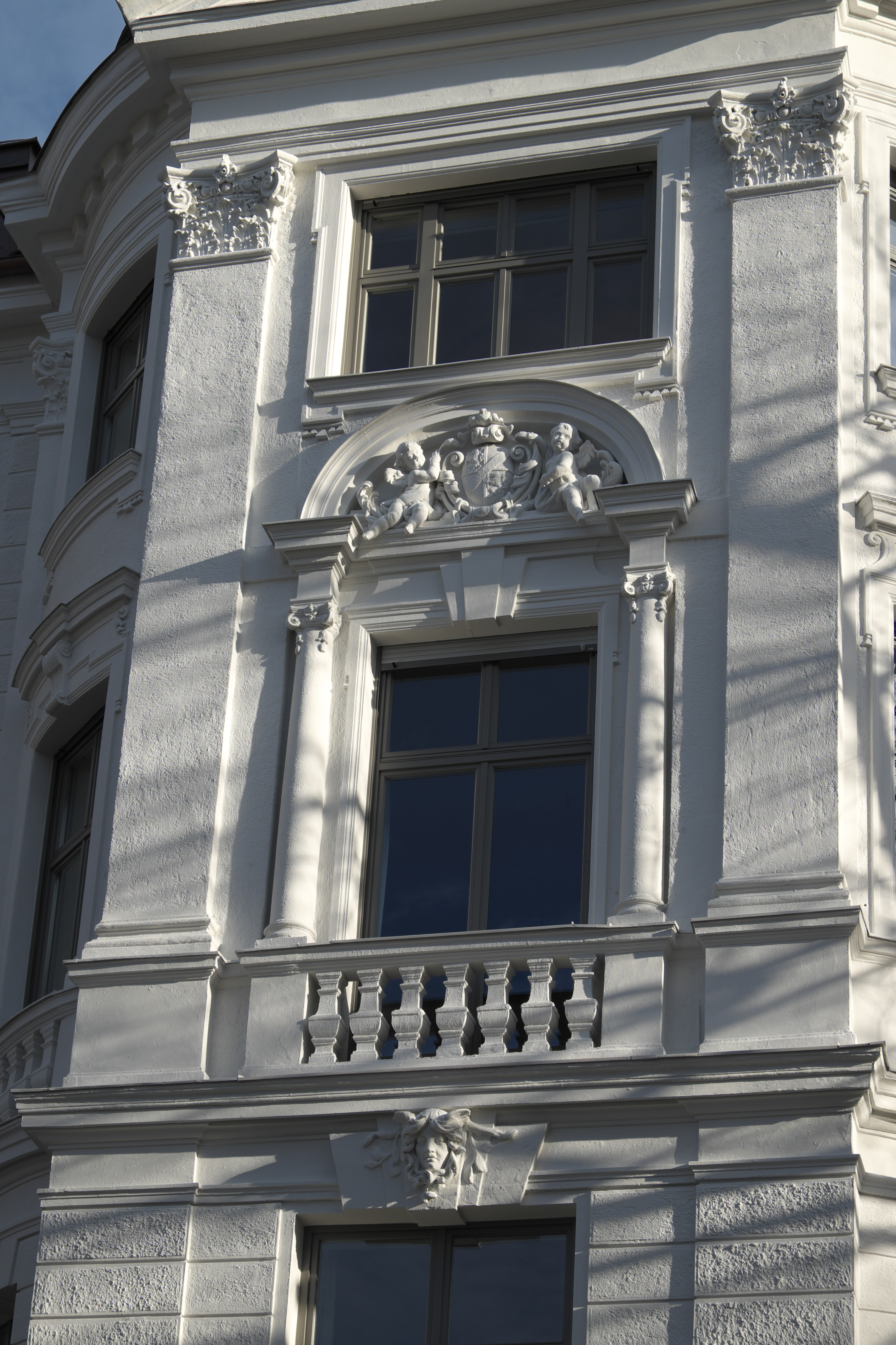 Eckhaus in der Schackstraße 2 im Stadtbezirk Maxvorstadt in München (Bayern/Deutschland), 1896/97 von Leonhard Romeis erbaut